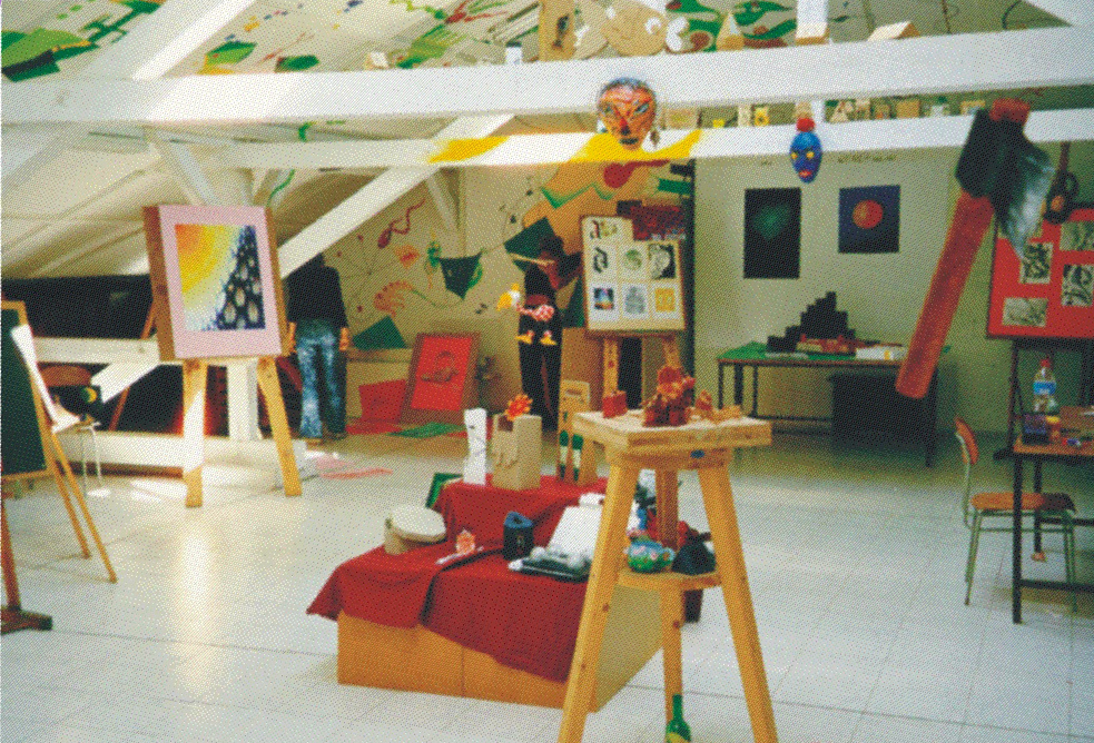 Pohled do ateliéru školy ve Štětí